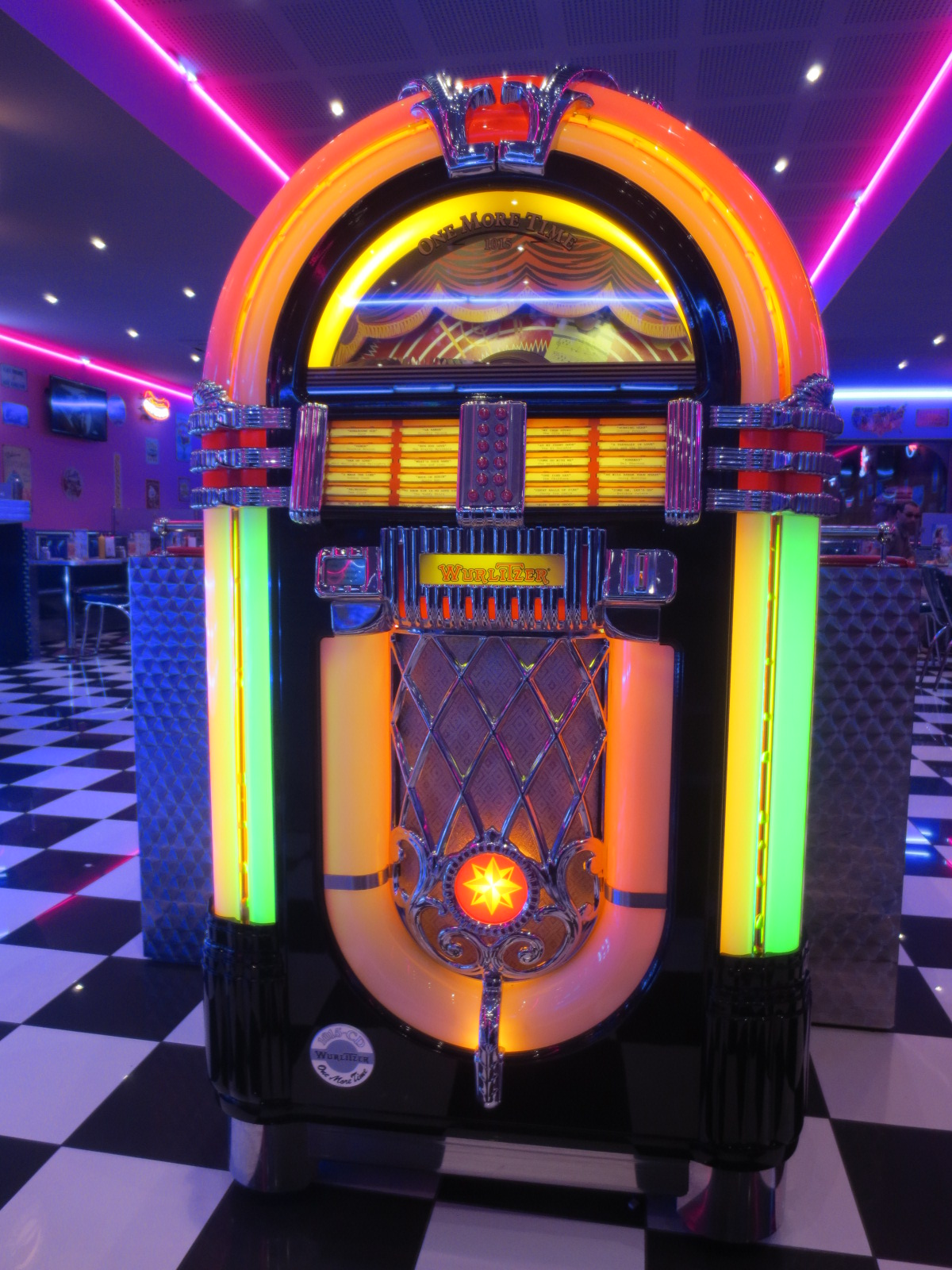 Memphis Coffee